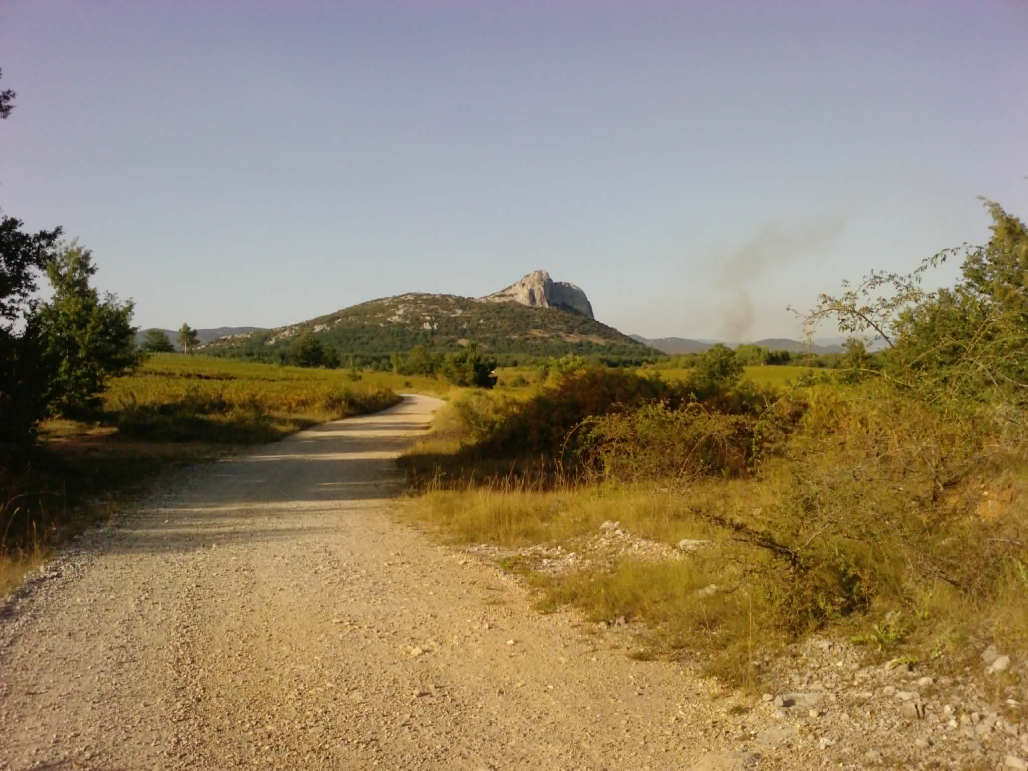 Zir